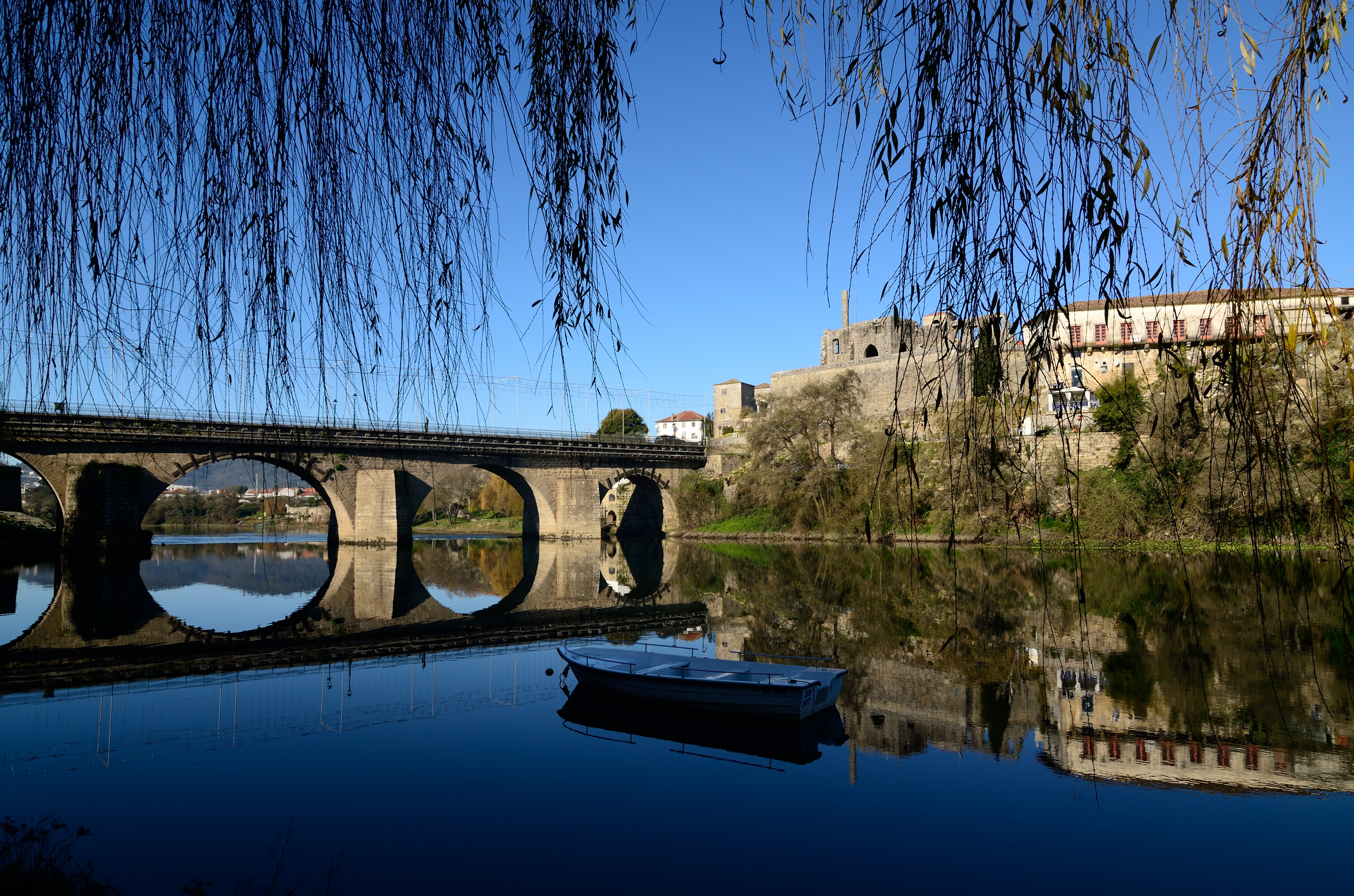 Barcelos, Portugal [2011]